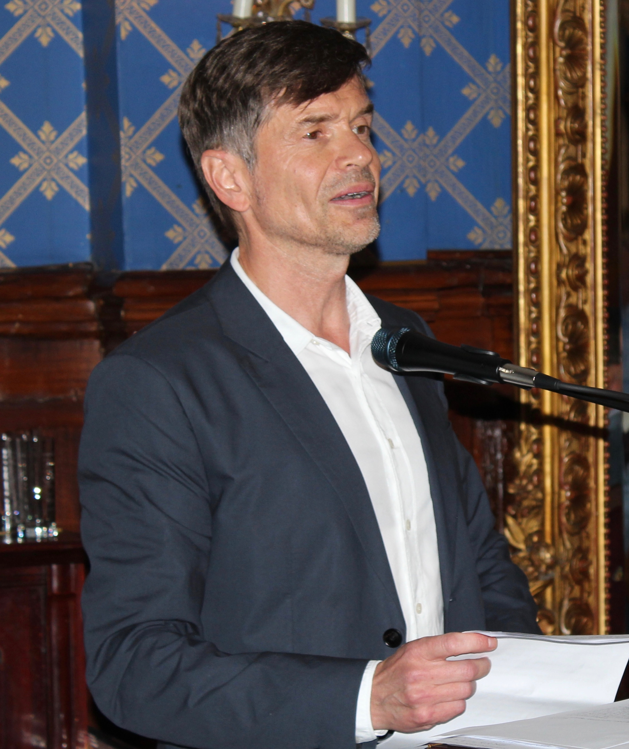 Kjetil Rolness under mottakelse av Gullpennen i Riksmålsforbundet i 2016.